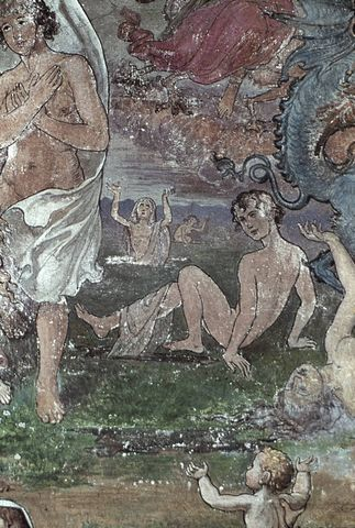 Heinrich Vogtherr der Ältere: Auferstehung der Seelen, Detail aus seinem Fresko: Das Jüngste Gericht, Stadtkirche Bad Wimpfen um 1523. Restauriert um 1875 von August Noack